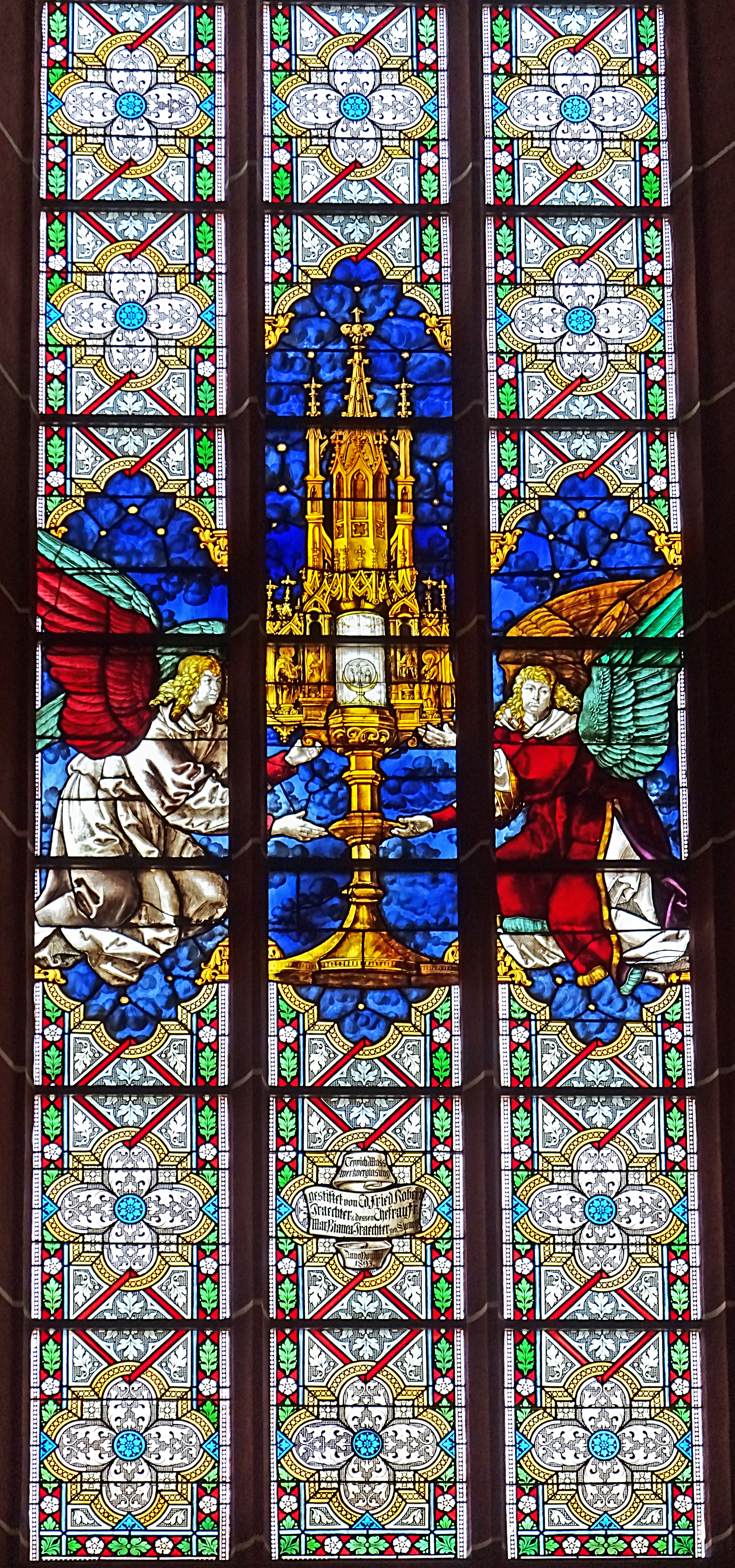 Engel tragen eine Monstranz, Buntglasfenster in der Johanneskirche Saalfeld